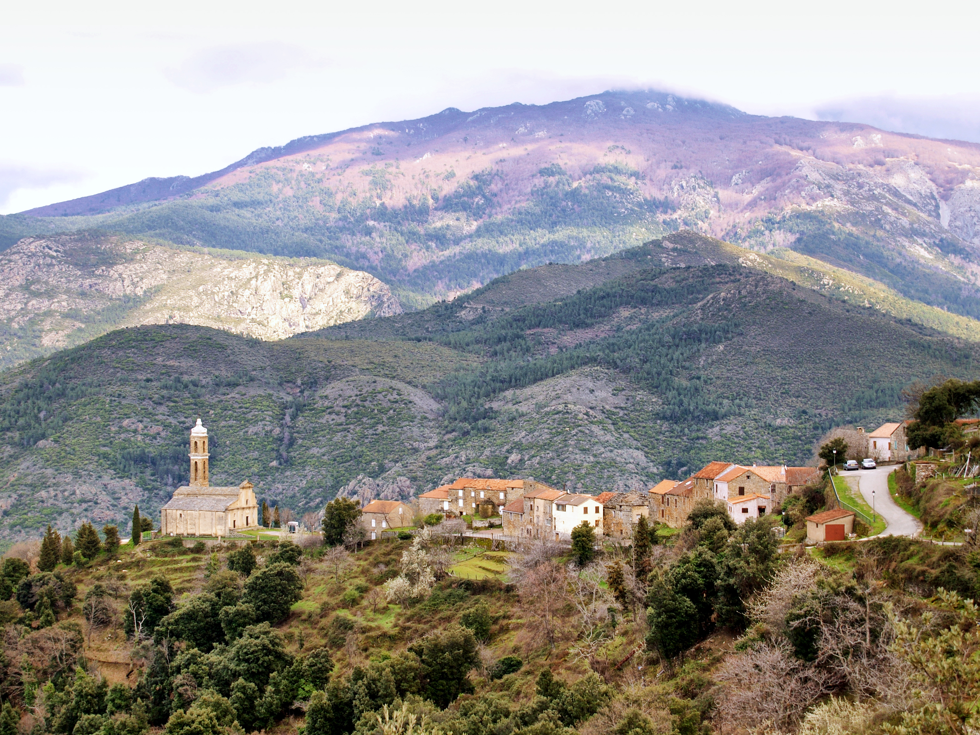 Aiti, Casaluna (Castagniccia / Corse) - Vue du village depuis la RD 239. En arrière-plan, Monte San Petrone